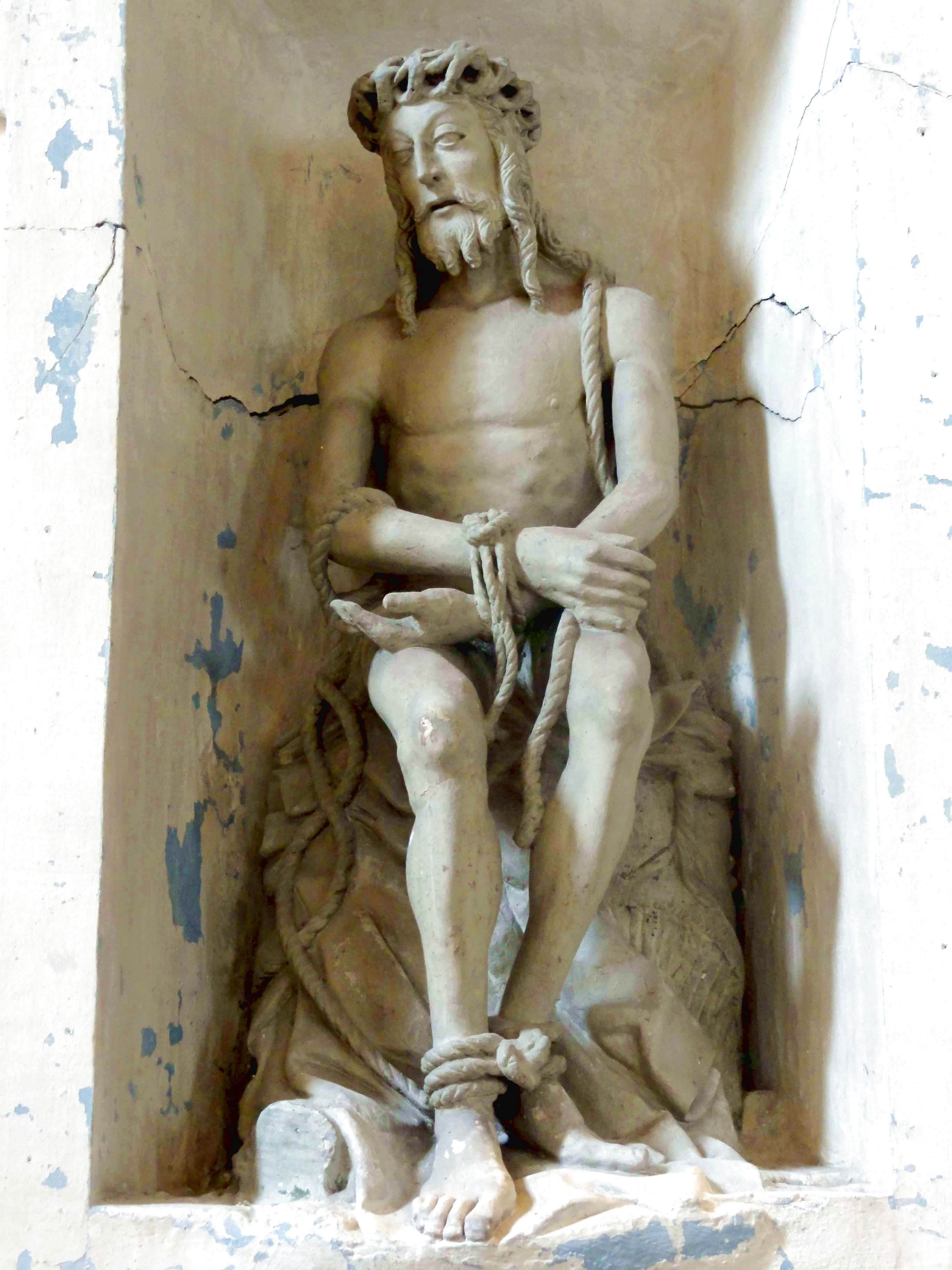 Statuette du Christ aux liens, pierre, XVIe siècle.